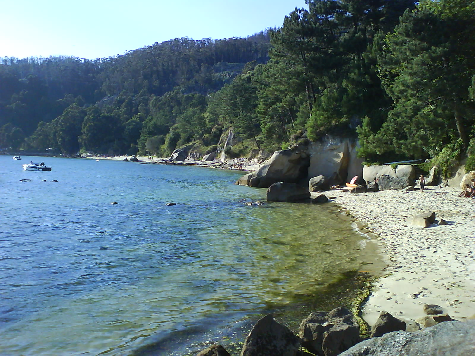 Playa A Borna en Moaña, Pontevedra, Galicia (España).